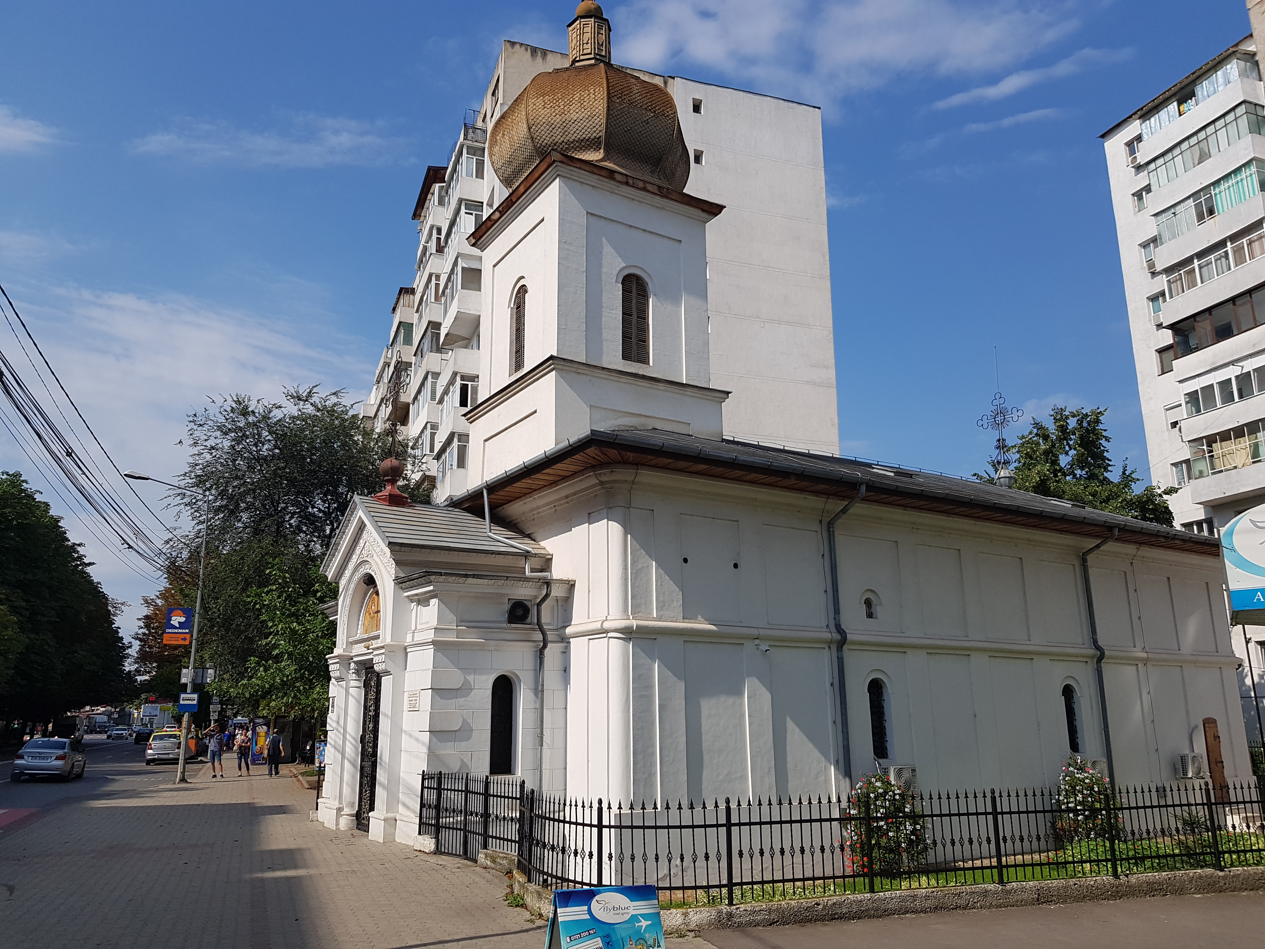 Biserica „Sf. Împărați Constantin și Elena” 01